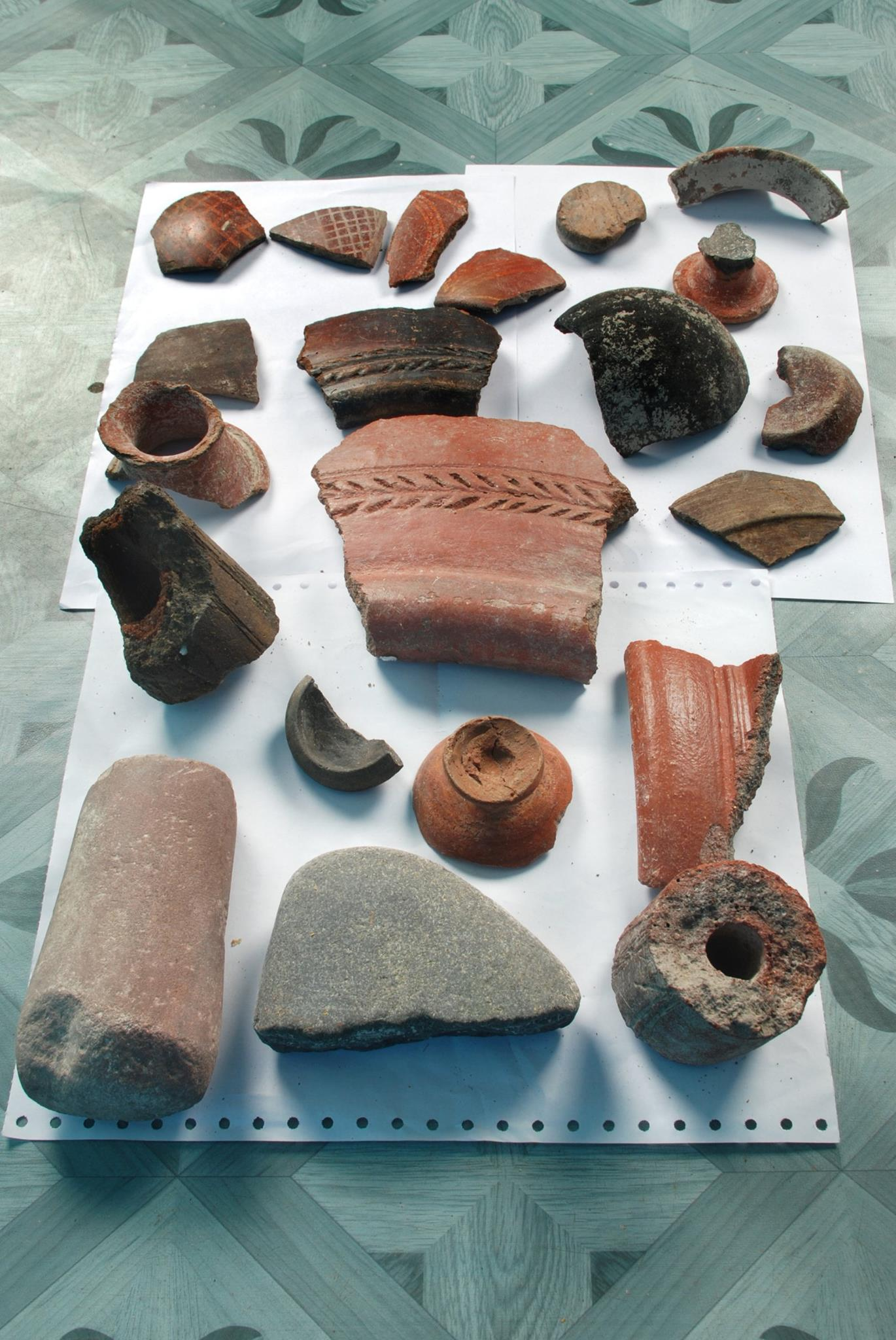 கோயம்புத்தூர், கௌசிகா நதி பகுதியில் சுமார் 2000 ஆண்டு கால வரலாற்று தொல்லியியல் பொருள்.இது செல்வராஜ் ,செயலாளர் ,அத்திக்கடவு கௌசிகா நதி மேம்பாட்டு சங்கம் .கோயம்புத்தூர், அவர்களால் ஆய்வுக்குக்கு அனுப்பப்பட்டு ஆய்வறிக்கை சமர்பிக்கப்பட்டுள்ளது .KOUSIKA RIVER,INDIA,TAMILNADU,COIMBATORE.